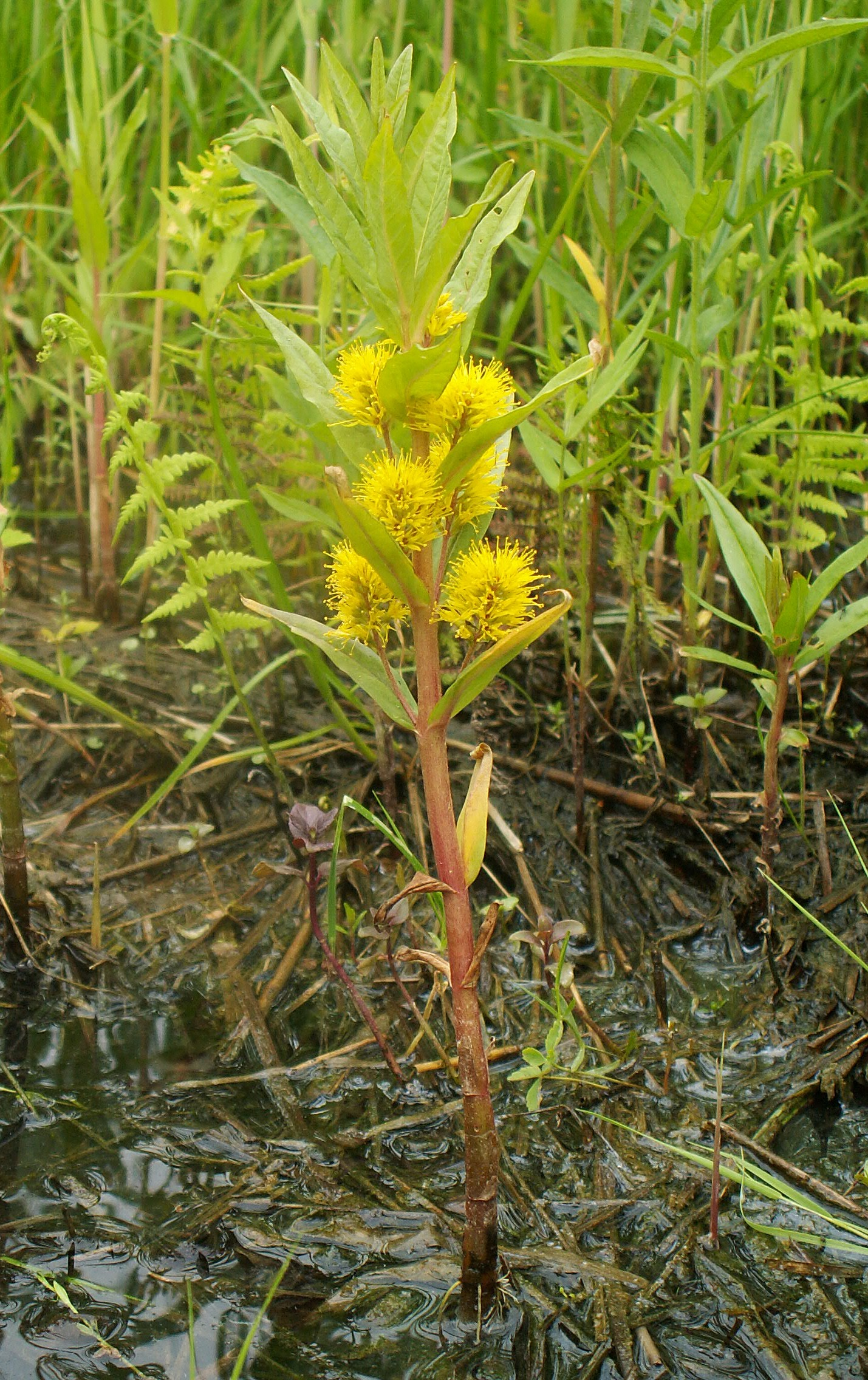 Lysimachia thyrsiflora. Rozwarowo, NW Poland